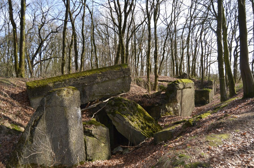 Det sprængte Gammelskov Batteri